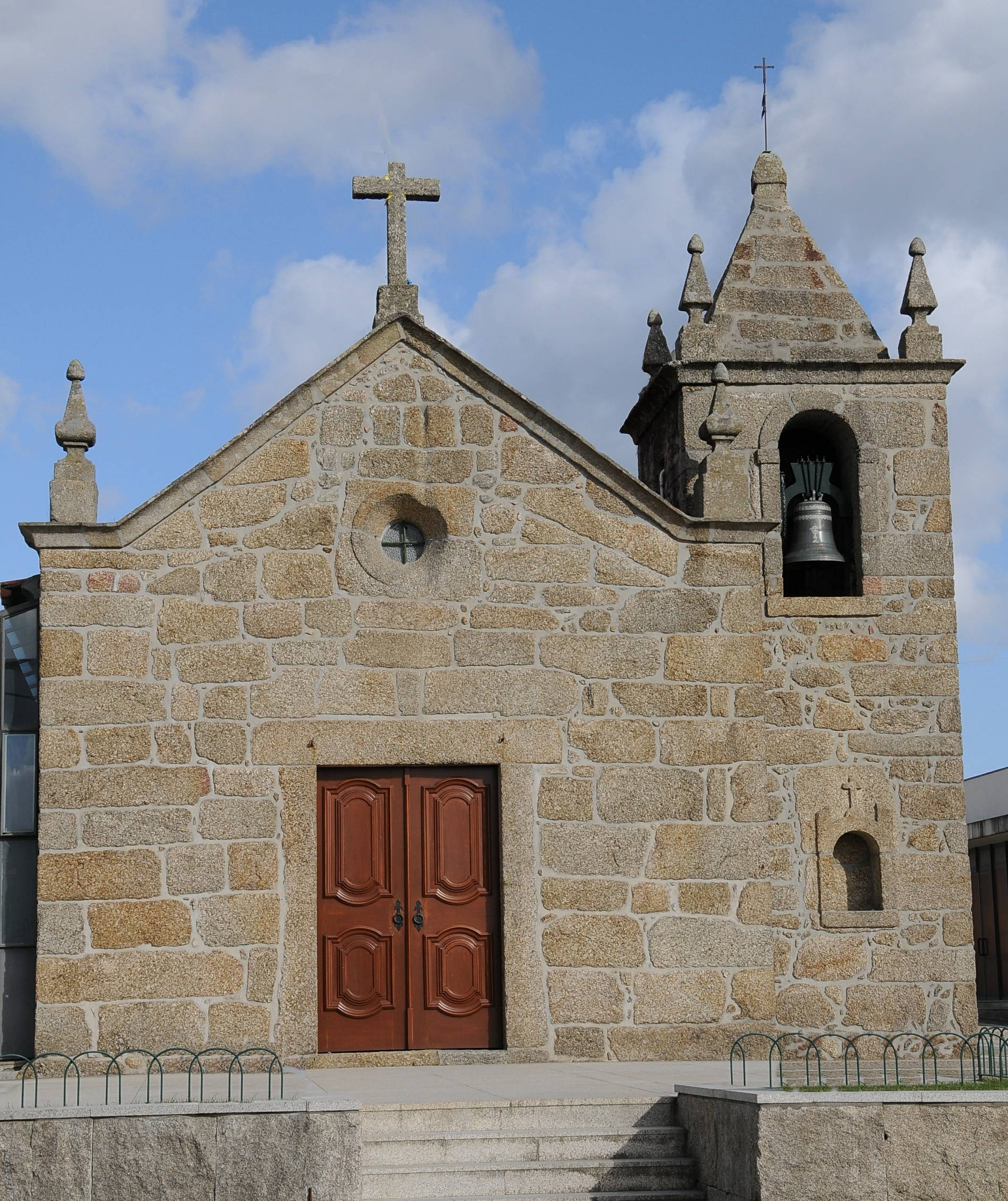 Guisande Church in Braga, Portugal